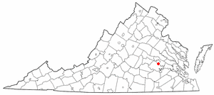 va maps